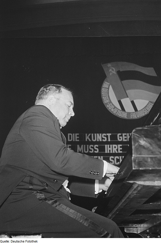 Original image description from the Deutsche Fotothek Auftritt des Pianisten Lew Nikolajewitsch Oborin